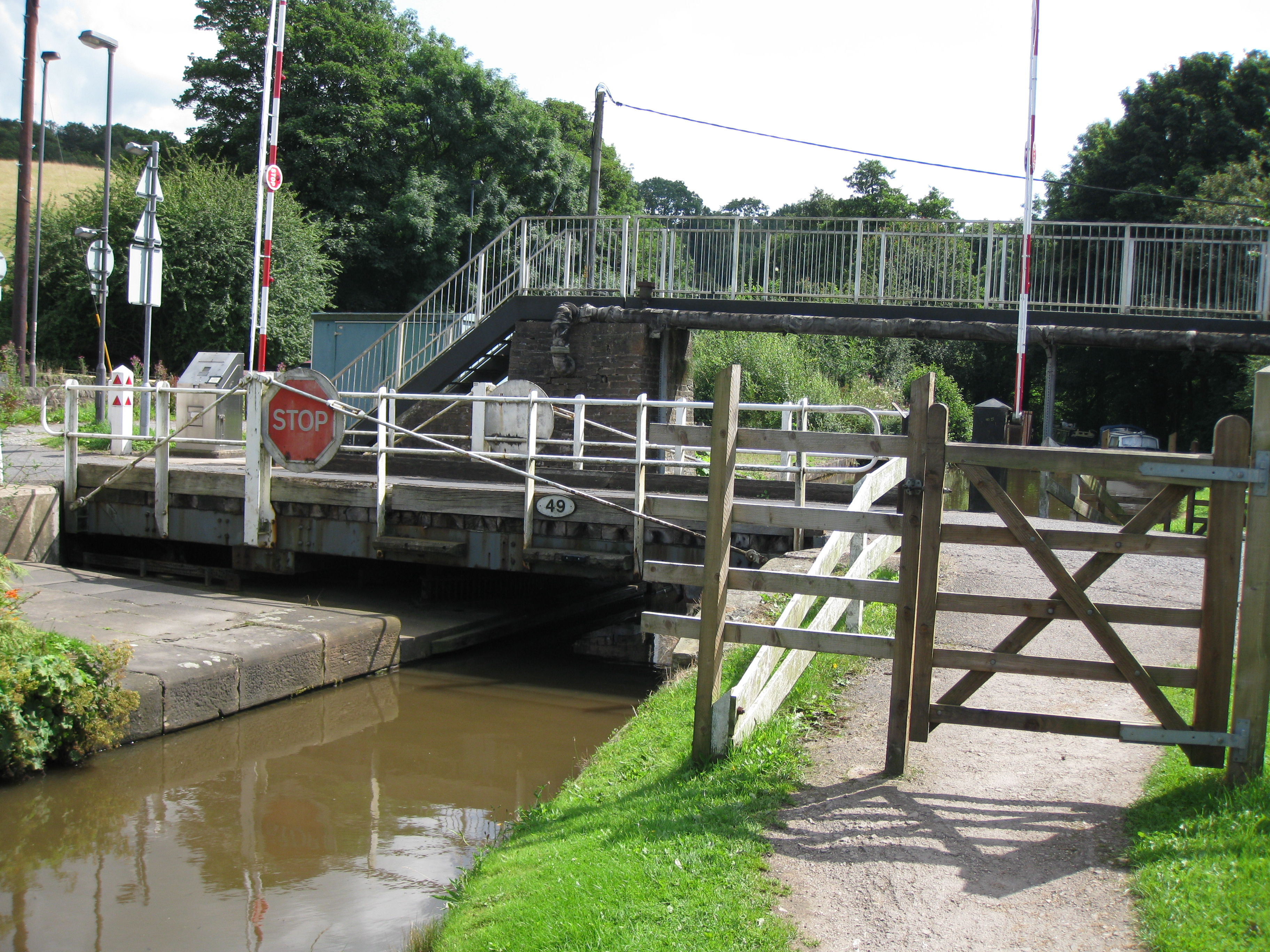 Royal Oak Swing Bridge